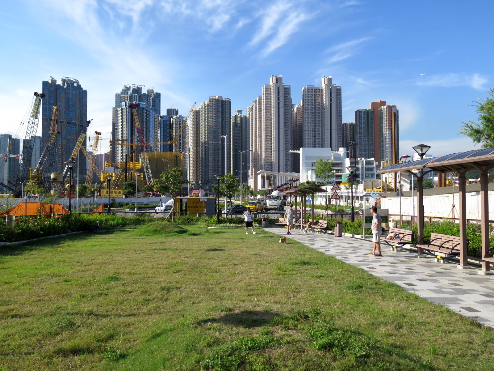 Tseung Kwan O Waterfront Promenade Pet Garden